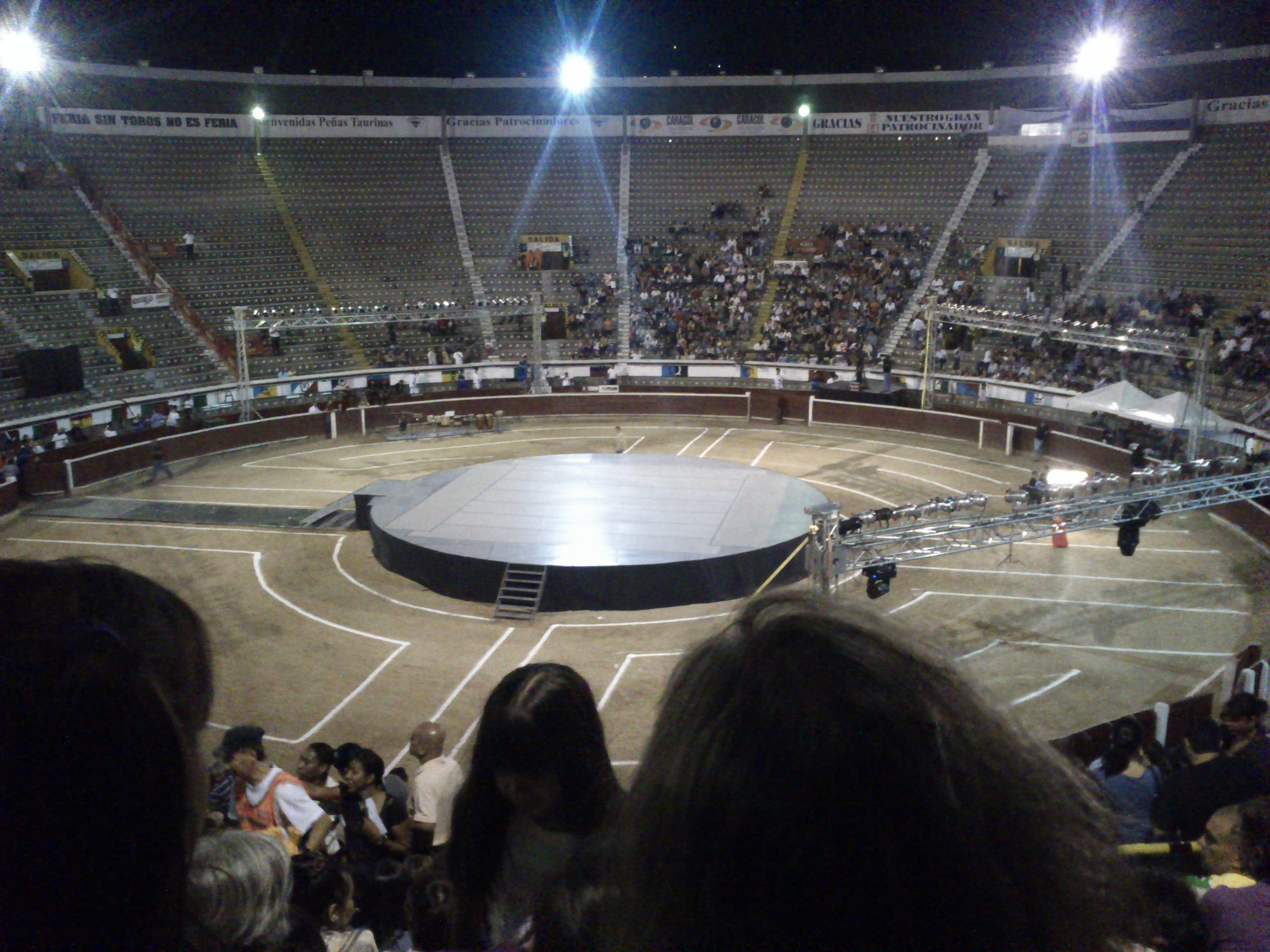 La Plaza de toros de Cali en la inauguración del IV Festival Internacional de Ballet